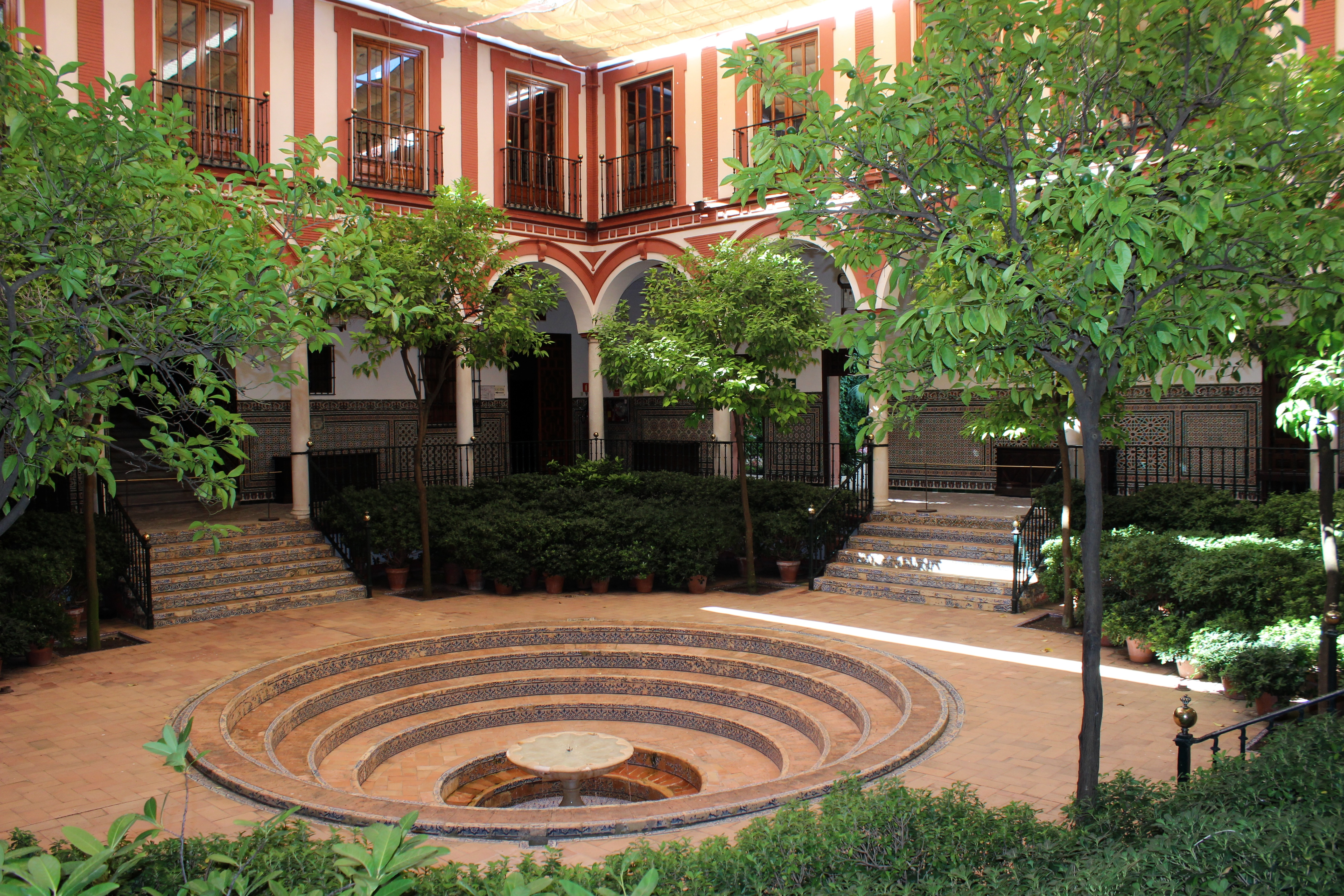 Sevilla. Hospital de los Venerables. Claustro.